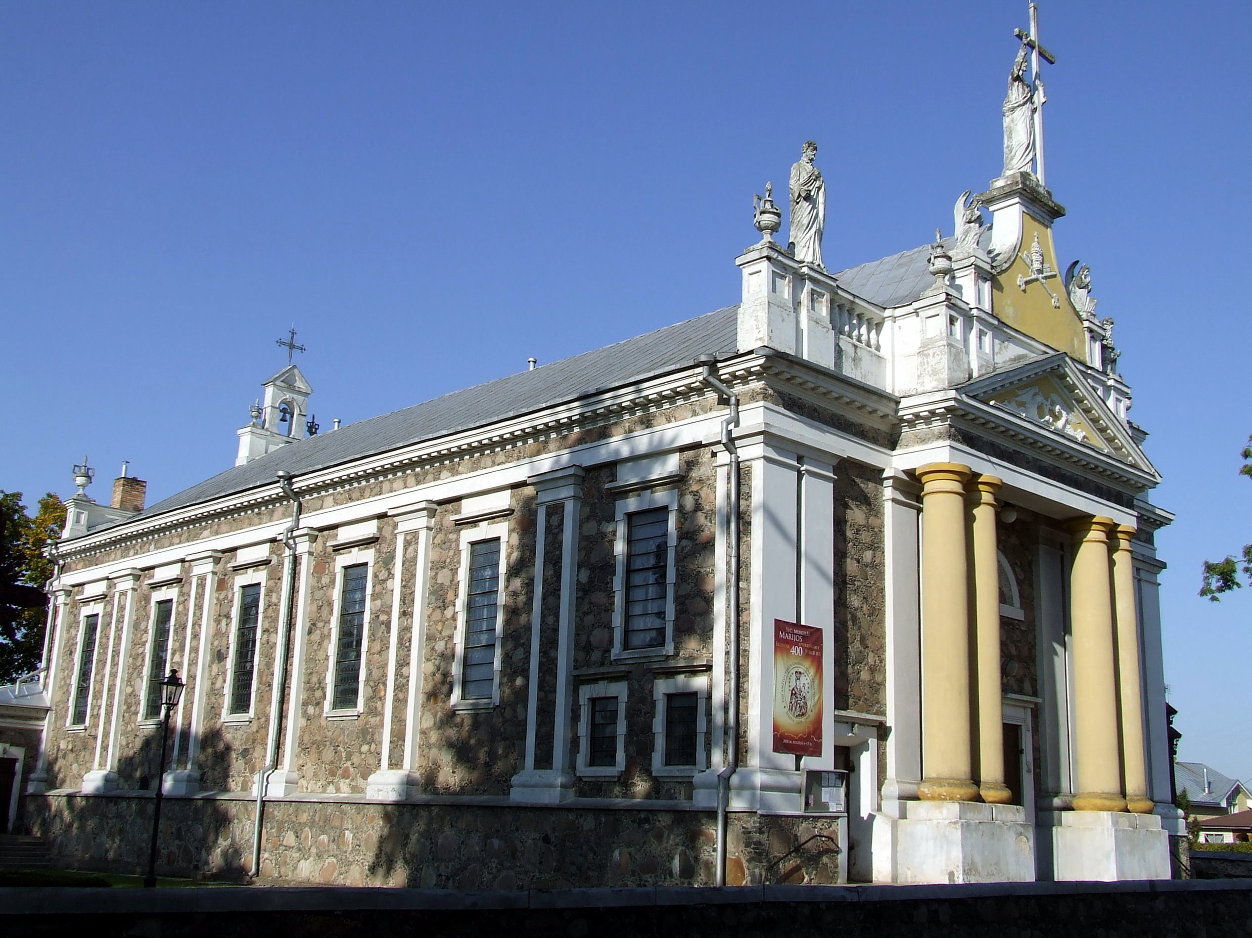 Šv. apaštalų Petro ir Povilo church, Ukmergė, Lithuania.